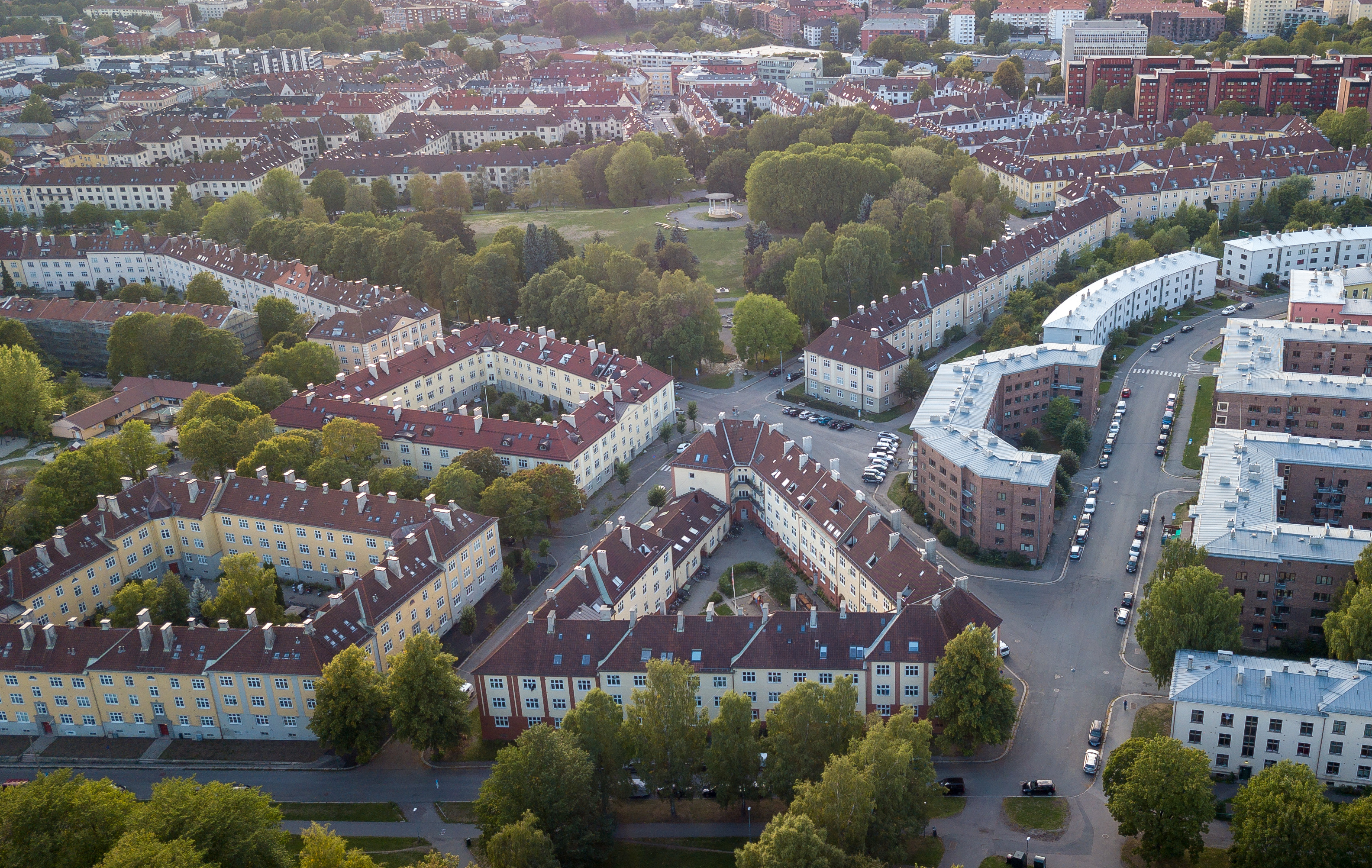 Luftfoto av Torshov og Sandaker-området i Oslo.